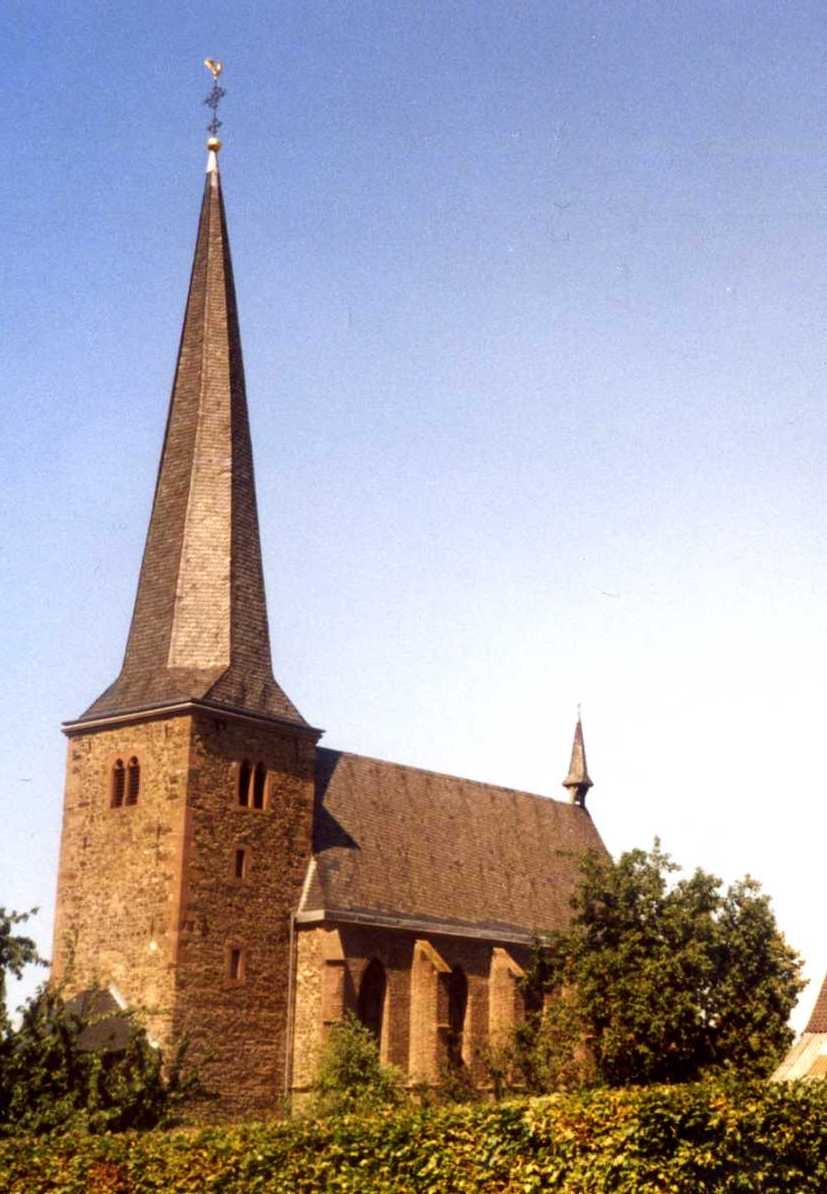 Katholische Kirche in Lamersdorf, Gemeinde Inden, Kreis Düren, Nordrhein-Westfalen, Deutschland